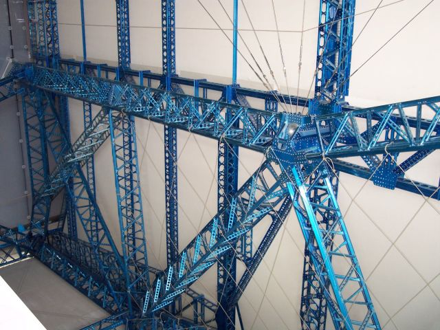 Struktur eines Zeppelin aus Duraluminiumprofilen